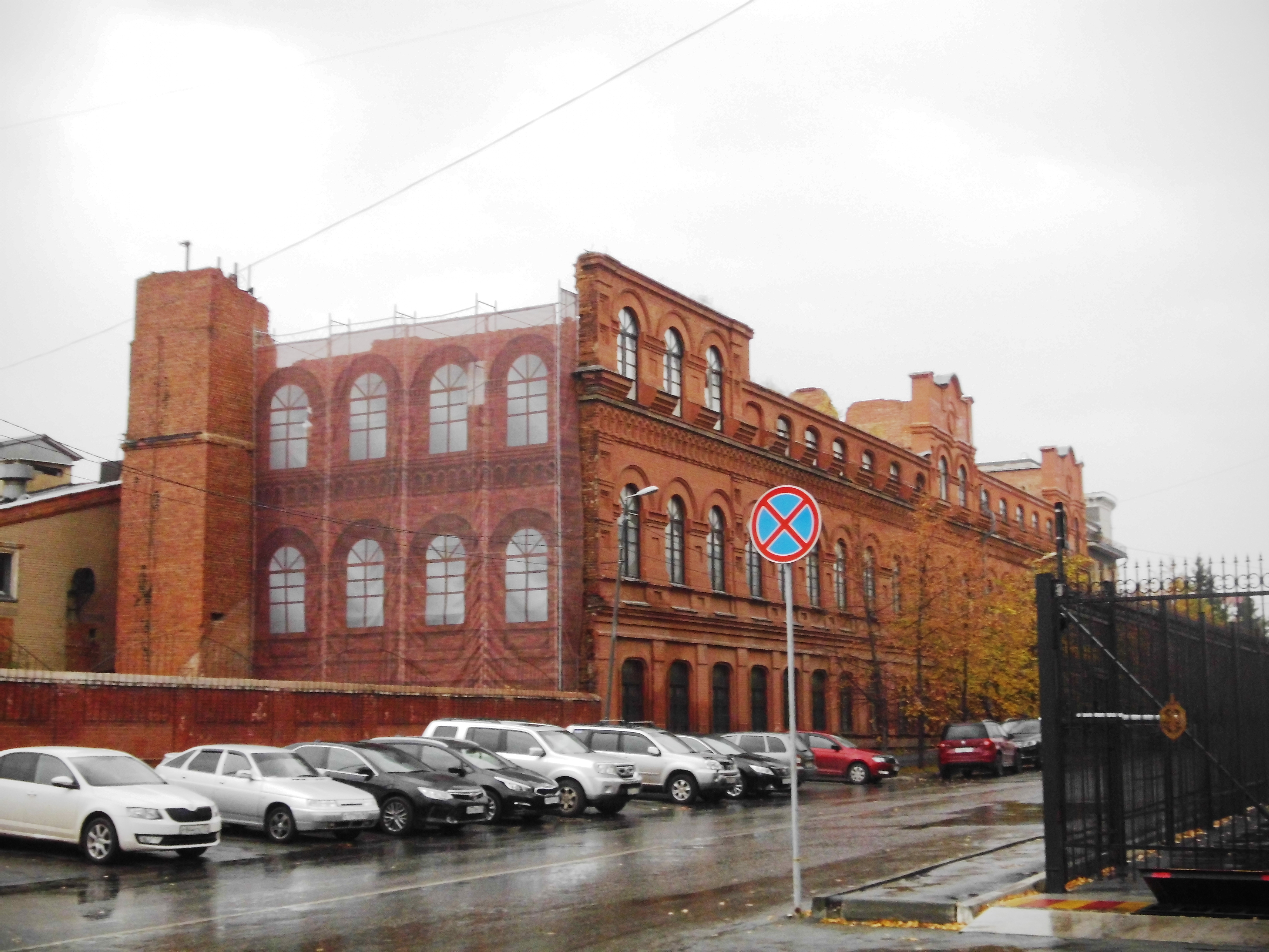 Чаеразвесочная фабрика Кузнецова: улица Васенко, 37, Челябинск, Челябинская область.Левая (северная, на фото слева) и передняя (западная, со стороны проезжей части ул. Васенко) стороны здания. Проглядывается отсутствие крыши и наличие только наружной стены здания, слева фасад завешан декоративной сеткой имитирующей фасад. Вид с северо-западного направления с пересечения улиц Васенко и Карла Маркса.